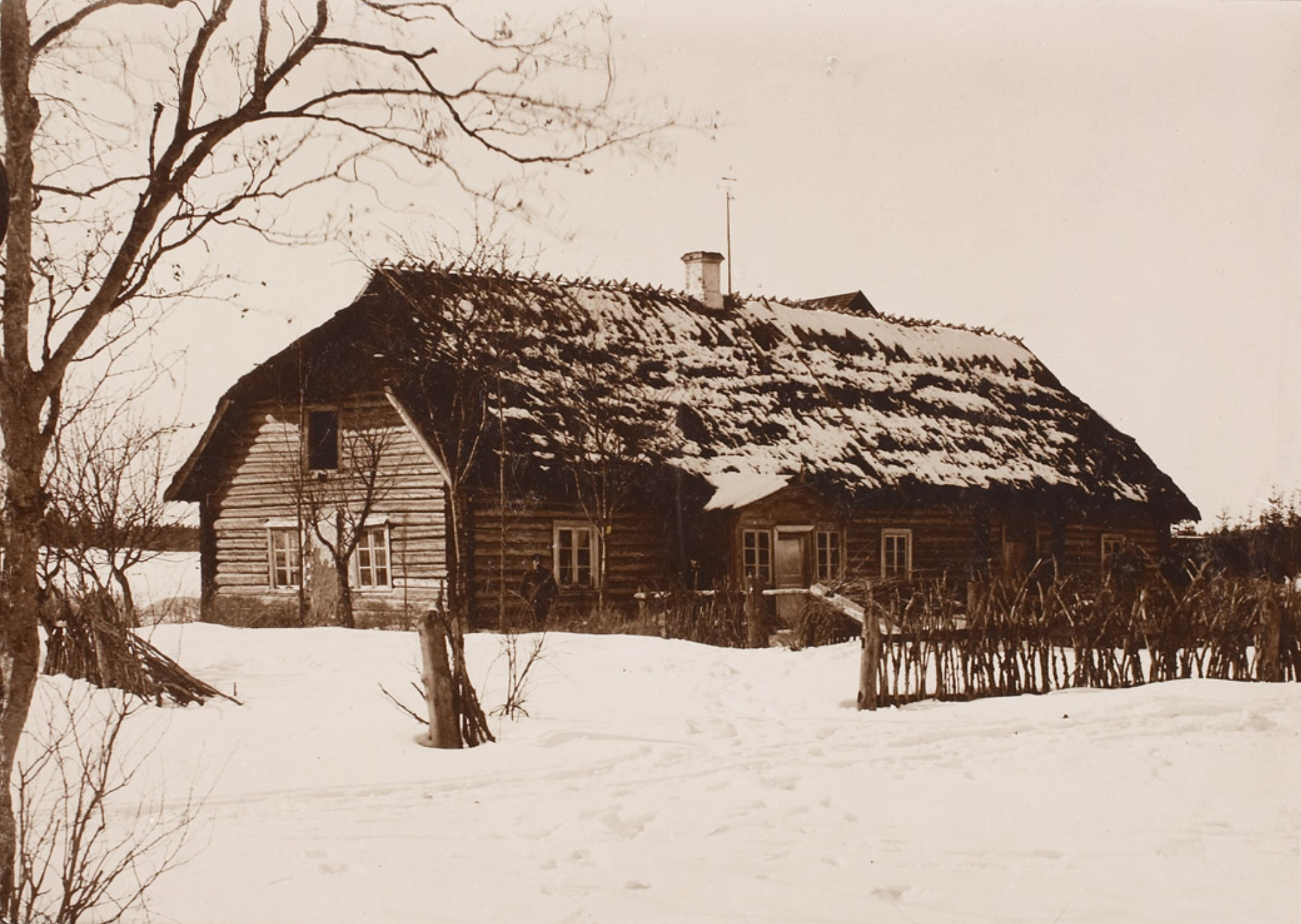 Tolli mõisa koolimaja 19. sajandi lõpus